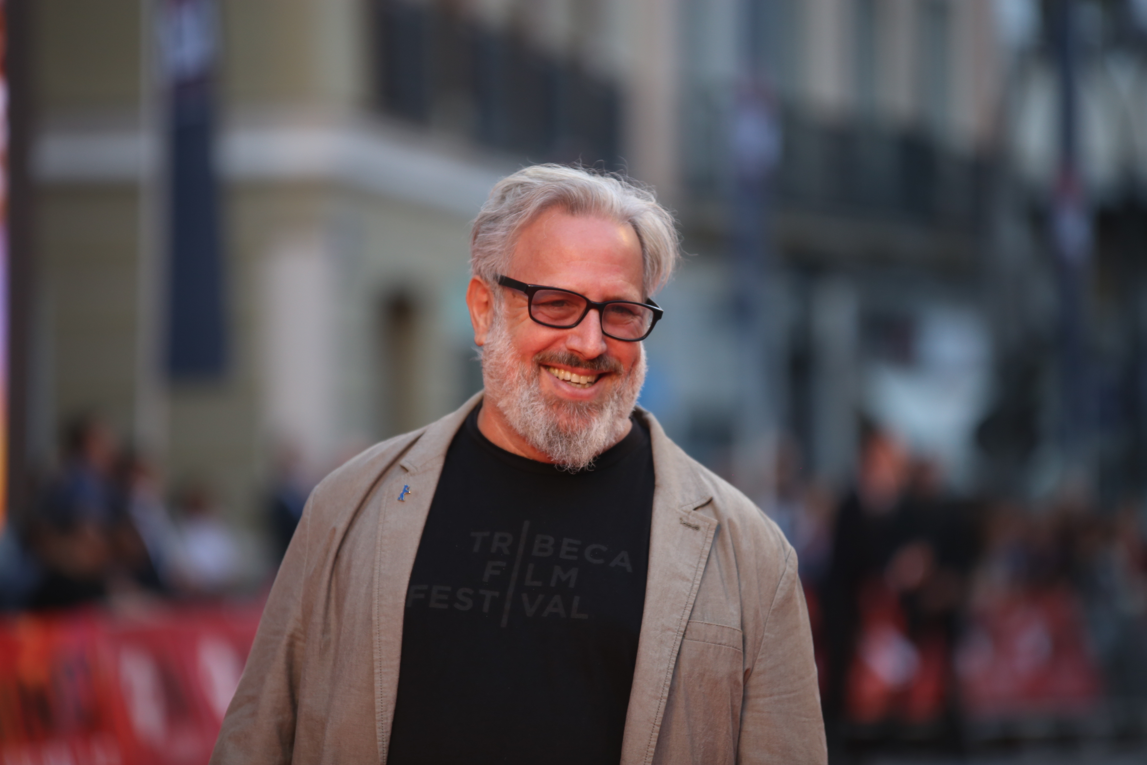 Seminci 2016